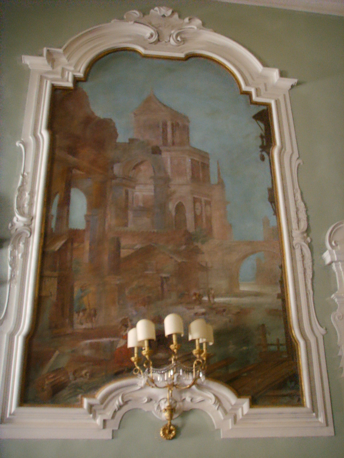 Palazzo Ximenes panciatichi da sangallo, salone